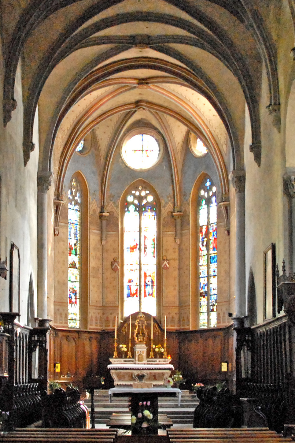 Mozac, Chor